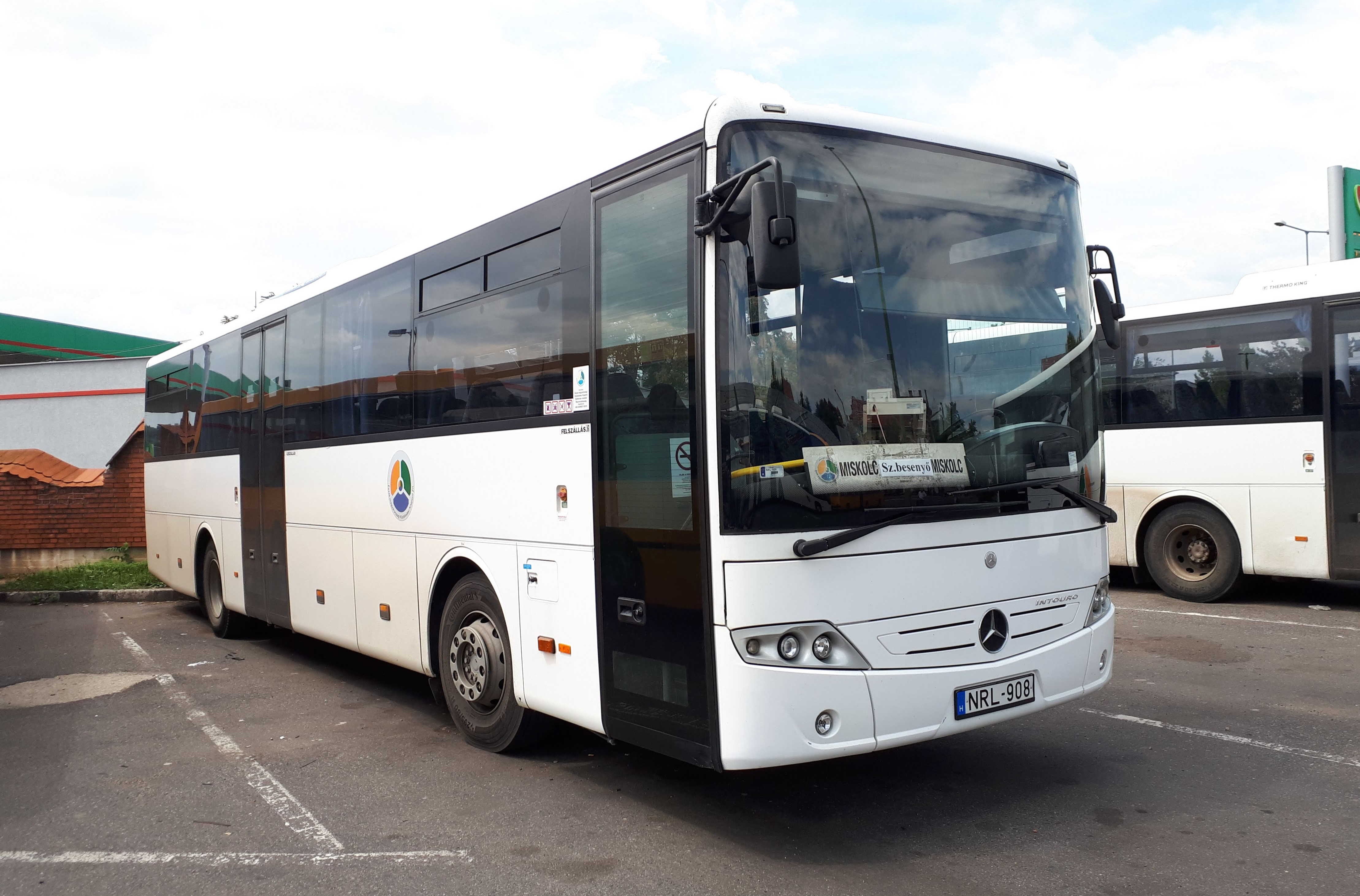 Az ÉMKK NRL-908 rendszámú Mercedes Intouro busza Miskolcon, a 3700-as helyközi járaton.